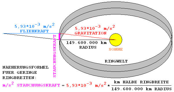 Näherungsformel für die Breiten-Stauchung der Ringwelt